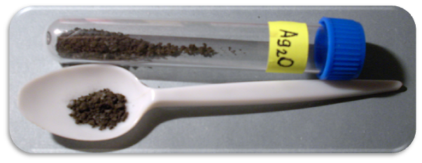 Oxid stříbrný - Ag2O